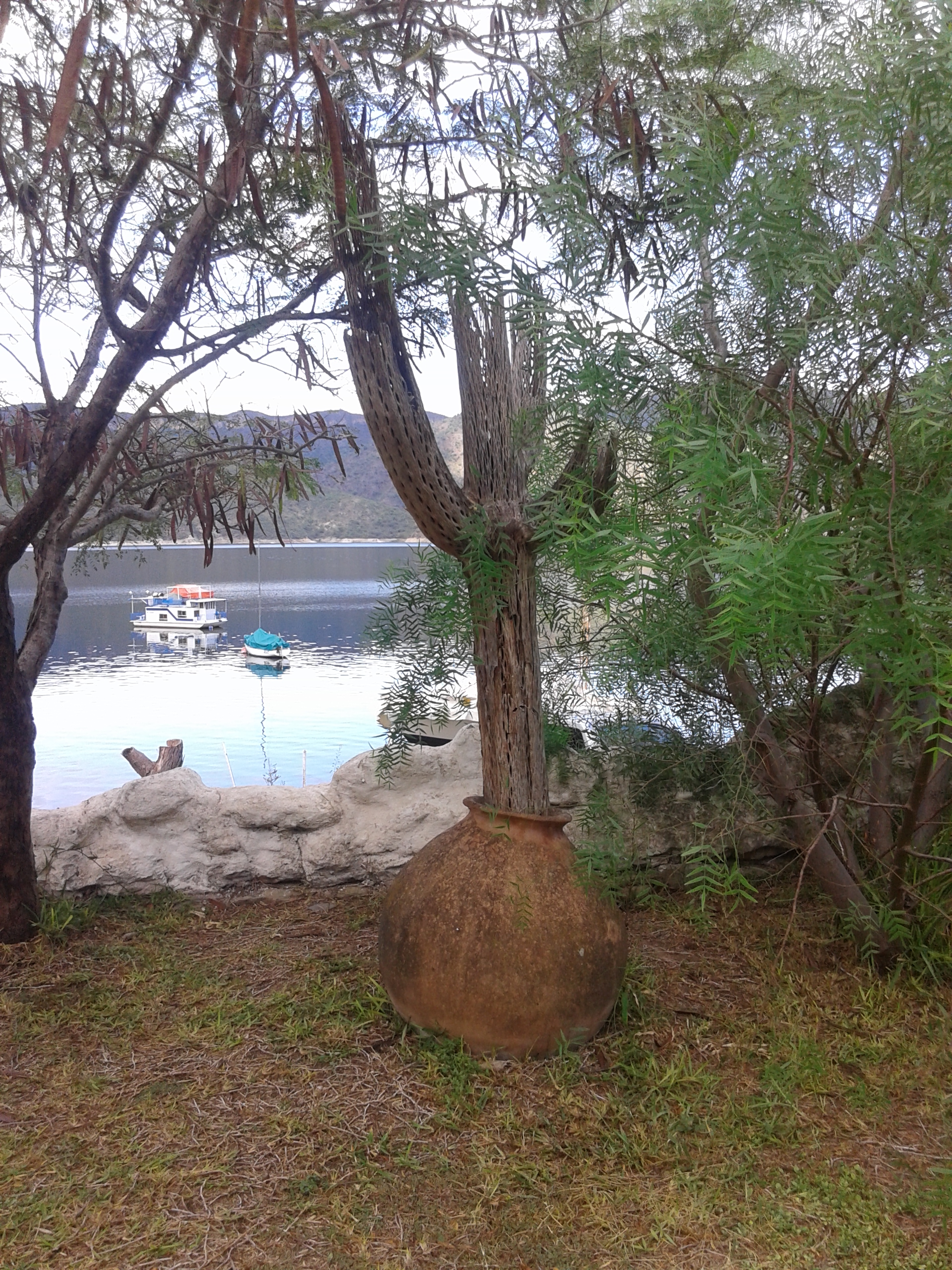 Cardón seco que está adentro de una vasija de cerámica de manera ornamental en en embalse Cabra Corral de Salta en el norte de Argentina.